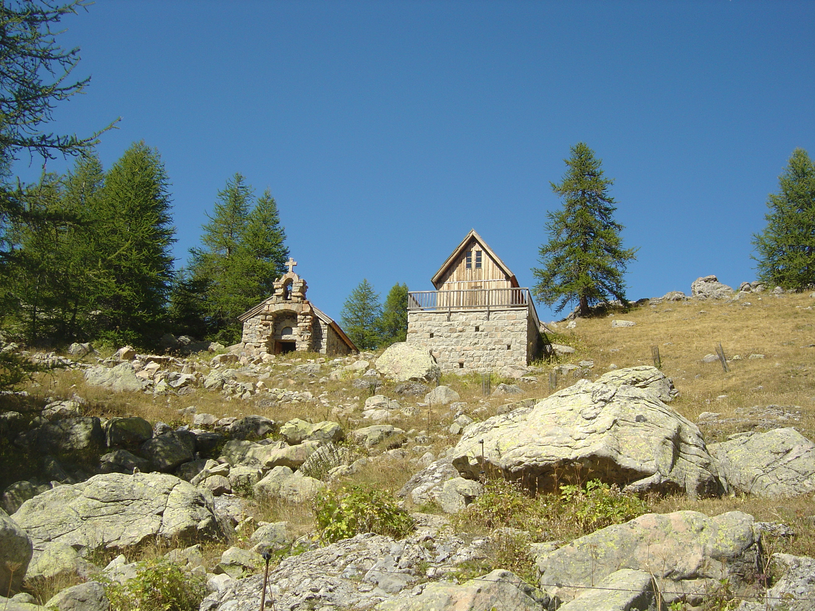 Chapelle Notre-Dame des Monts juste au-dessus du lac d'Allos